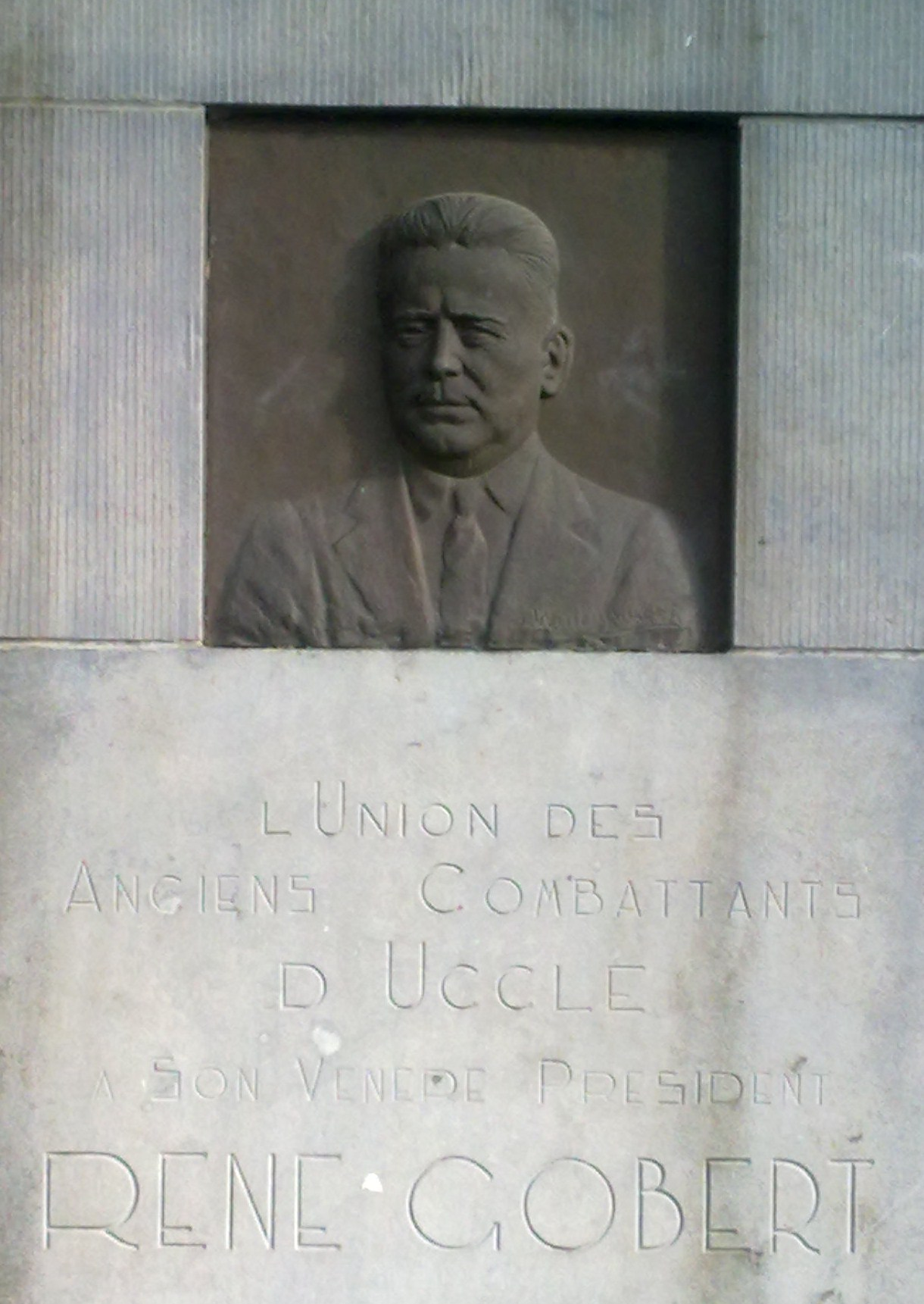 monsieur René Gobert citoyen d'Uccle (Belgique) combattant de 14-18, fusillé en 1945. Plaque commémorative square des Héros.